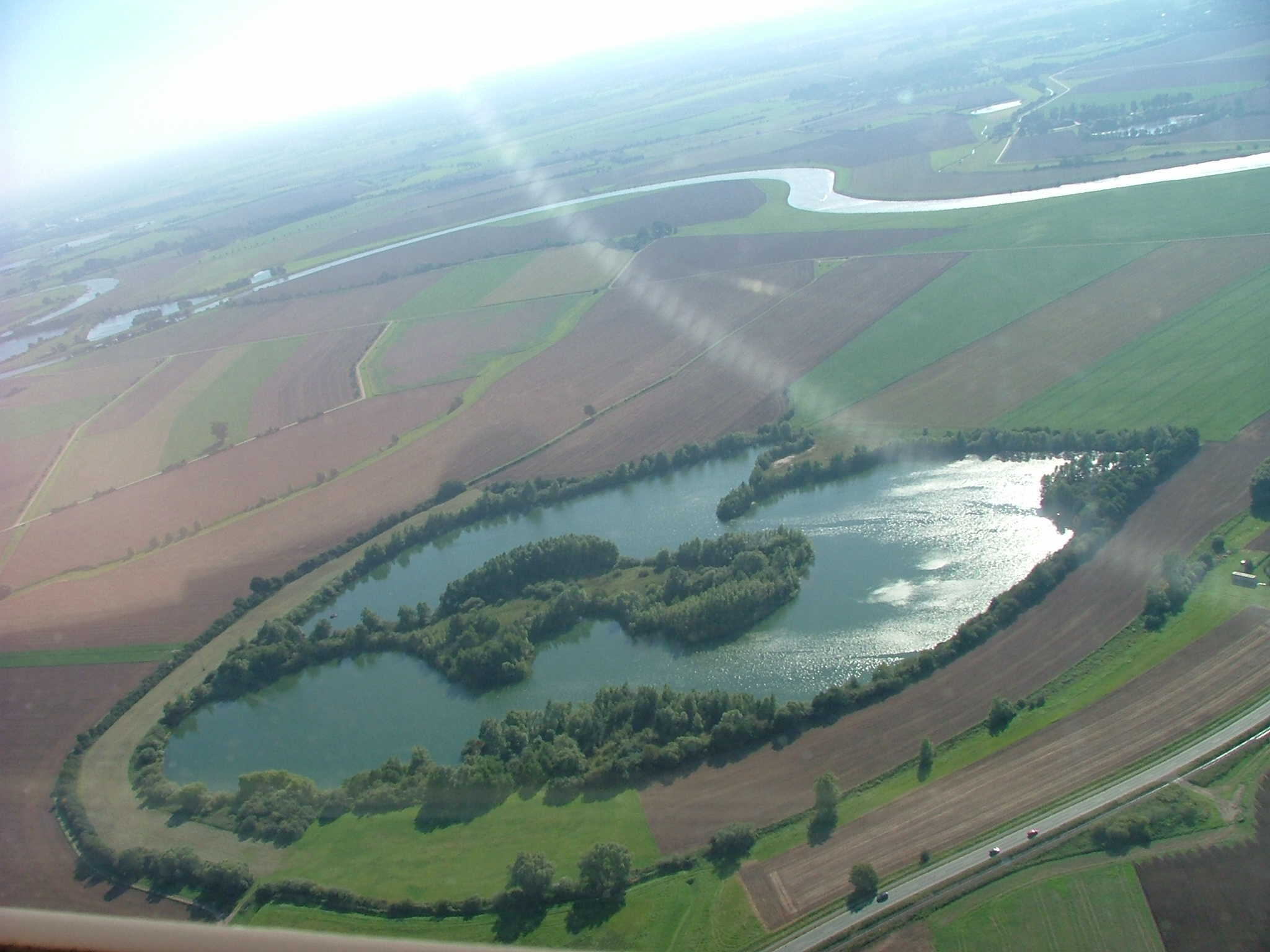 Luftaufnahme: Naturschutzgebiet Wiedesee in Hoya, Landkreis Nienburg/Weser, Niedersachsen